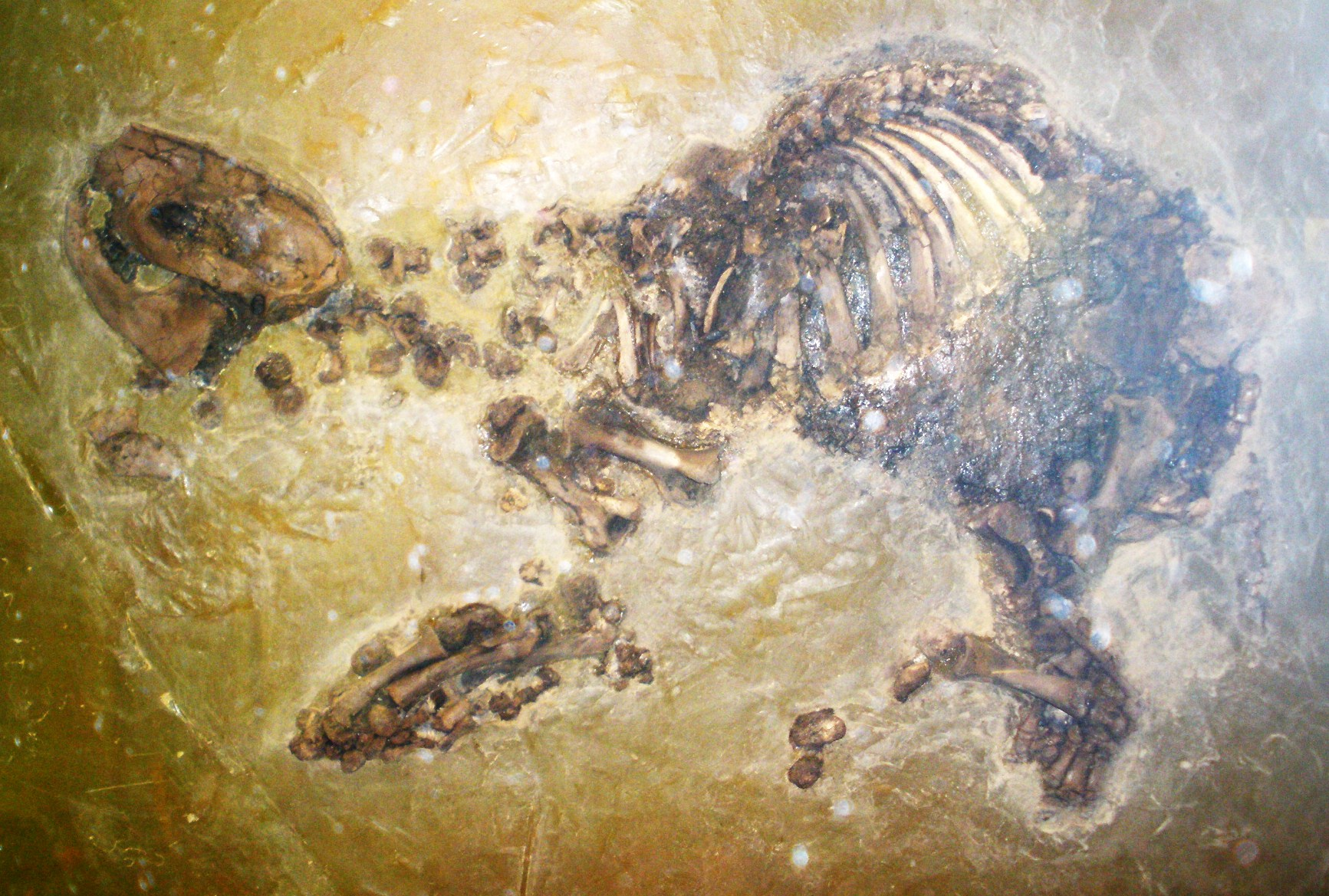 Fossil of Lophiodon, an extinct mammal- Took the photo at Senckenberg Museum of Frankfurt